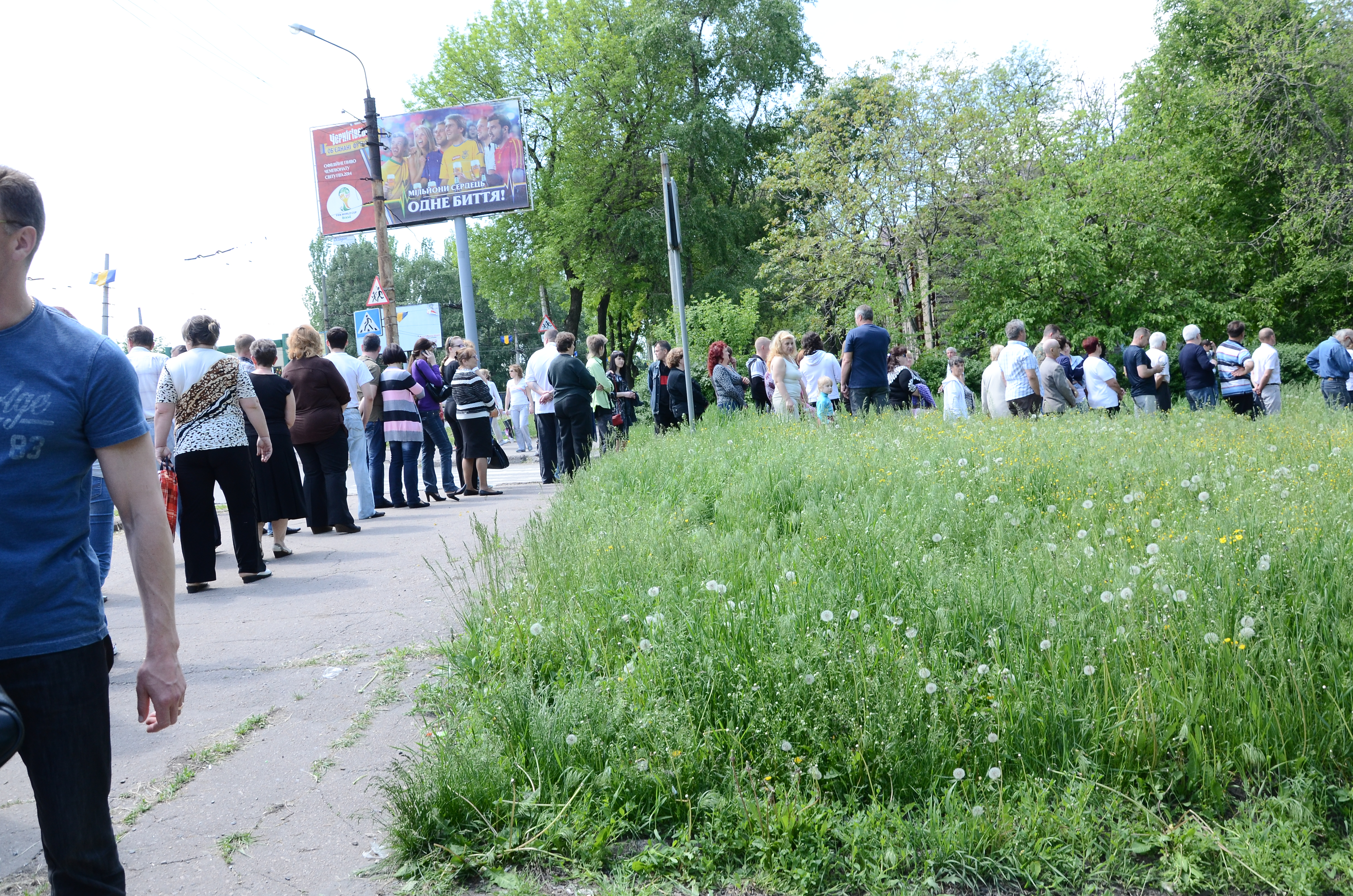 Референдум в Донецке